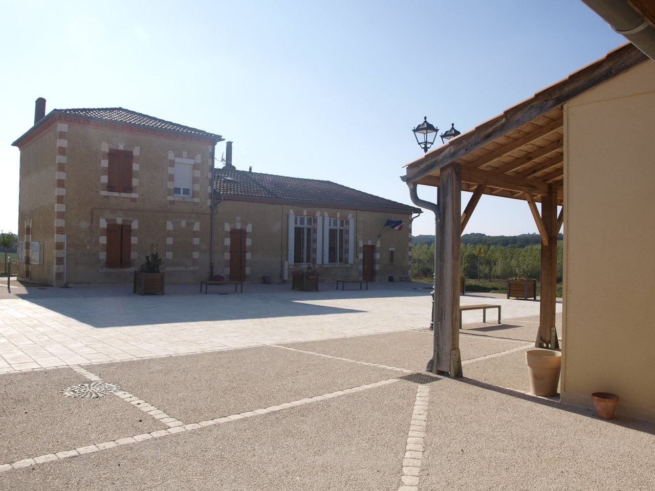 Photo de la mairie de Blanquefort